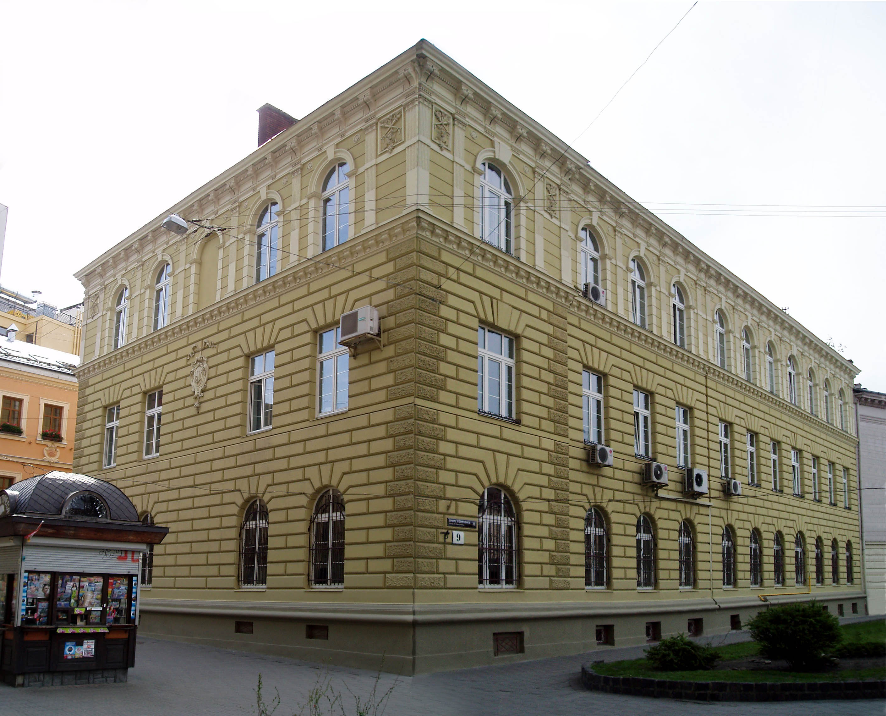 Будинок № 9 на проспекті Шевченка у Львові.